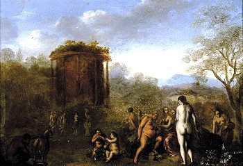 Vexa o título e as categorías.